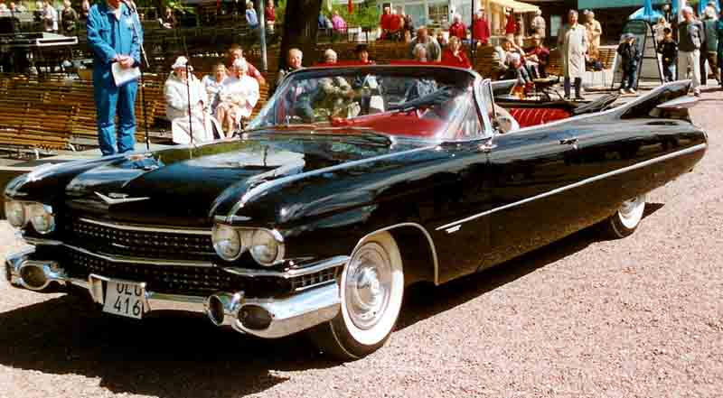 Cadillac Series 62 Convertible 1959